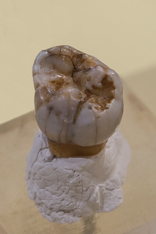 Im Jahr 2000 in der Denisova-Höhle gefundener Molar Denisova 4. Original, ausgestellt in der Sonderausstellung "Le troisième Homme" im Musée national de Préhistoire in Les Eyzies-de-Tayac, Frankreich.